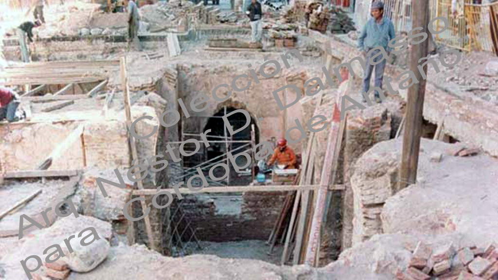 Livio Incatasciato 13 Cripta-1P